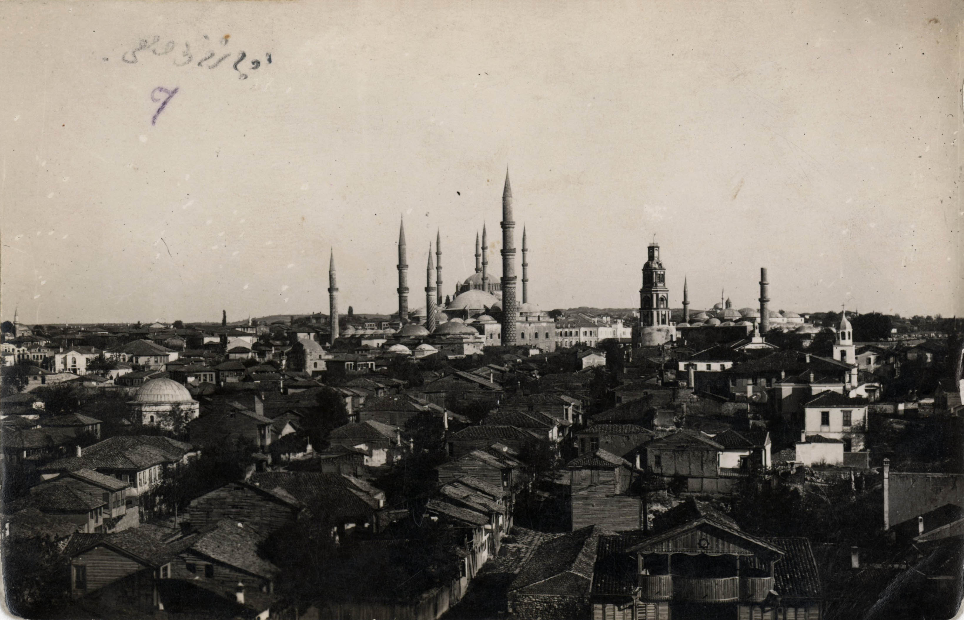 A clock tower was built on top of Macedonia Tower, one of the largest towers of Edirne Castle, on the order of Governor Hacı İzzet Paşa in 1884. This 48m tall tower had an octagonal plan with windows on every level. The clock, produced in France, was mounted in 1886. When the original wooden construction was destroyed by fire, the tower was rebuilt in 1894 from stone and brick and the clock renewed in 1926. Due to its neo-classical architecture its appearance differed from other Ottoman clock towers. In 1953 the tower was again partially destroyed, this time by an earthquake. Following a report by İstanbul Technical University, that studied the tower’s structure, silhouette and lack of heritage status, the decision was made to tear it down on July 6, 1953. SALT Research, Ali Saim Ülgen Archive Saatli Kule 1884’te, Edirne Kalesi’nin dört büyük burcundan Makedonya Kulesi’nin üstüne inşa edildi. Dönemin Edirne Valisi Hacı İzzet Paşa tarafından ahşap olarak yaptırıldı. Neo-klasik mimari özellikleriyle Osmanlı zamanında yapılan diğer saat kulelerinden ayrılmaktaydı. 48 metre yüksekliğindeki sekizgen planlı kulenin her katında aydınlatma pencereleri, son katında ise her yöne bakan saat kadranları vardı. Fransa’ya ısmarlanan saati, ancak iki yıl sonra monte edilebildi. Yapımından kısa bir süre sonra çıkan bir yangında hasar gören kule, 1894’te taş ve tuğla ile yeniden inşa edildi; 1926’da da saati yenilendi. Haziran 1953’te Edirne Depremi’nde büyük hasar gördü. İstanbul Teknik Üniversitesi’nden alınan bir rapor doğrultusunda, abidelerin yakınında ve silueti bozuyor olması, sanatsal değer taşımaması ve tamiri için ayrılacak masrafın gereksiz görülmesi gibi gerekçelerle Temmuz 1953’te dinamitlenerek yıkıldı. SALT Araştırma, Ali Saim Ülgen Arşivi